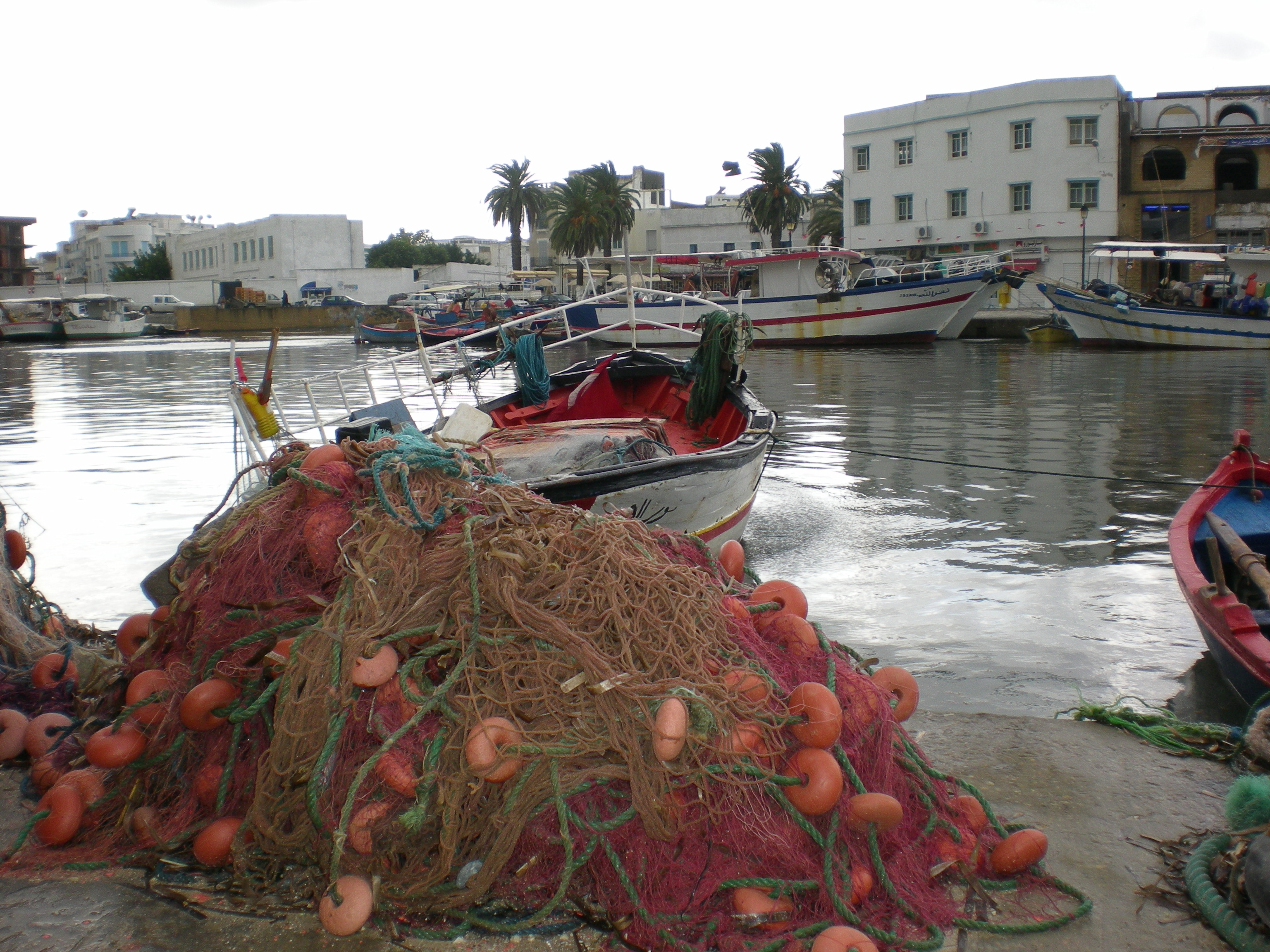 port de peche de Bizerte